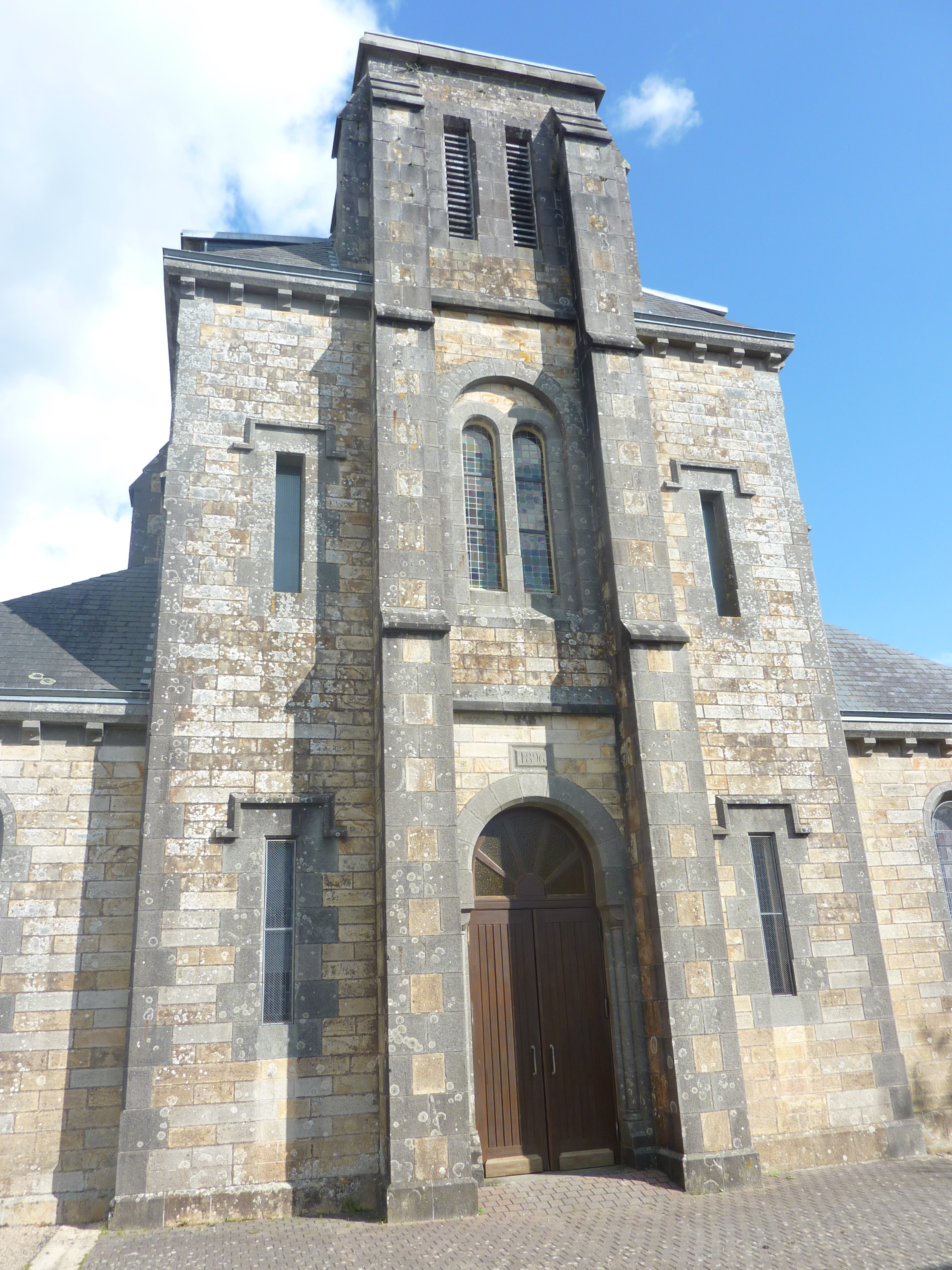 Loperhet : la façade de l'église paroissiale